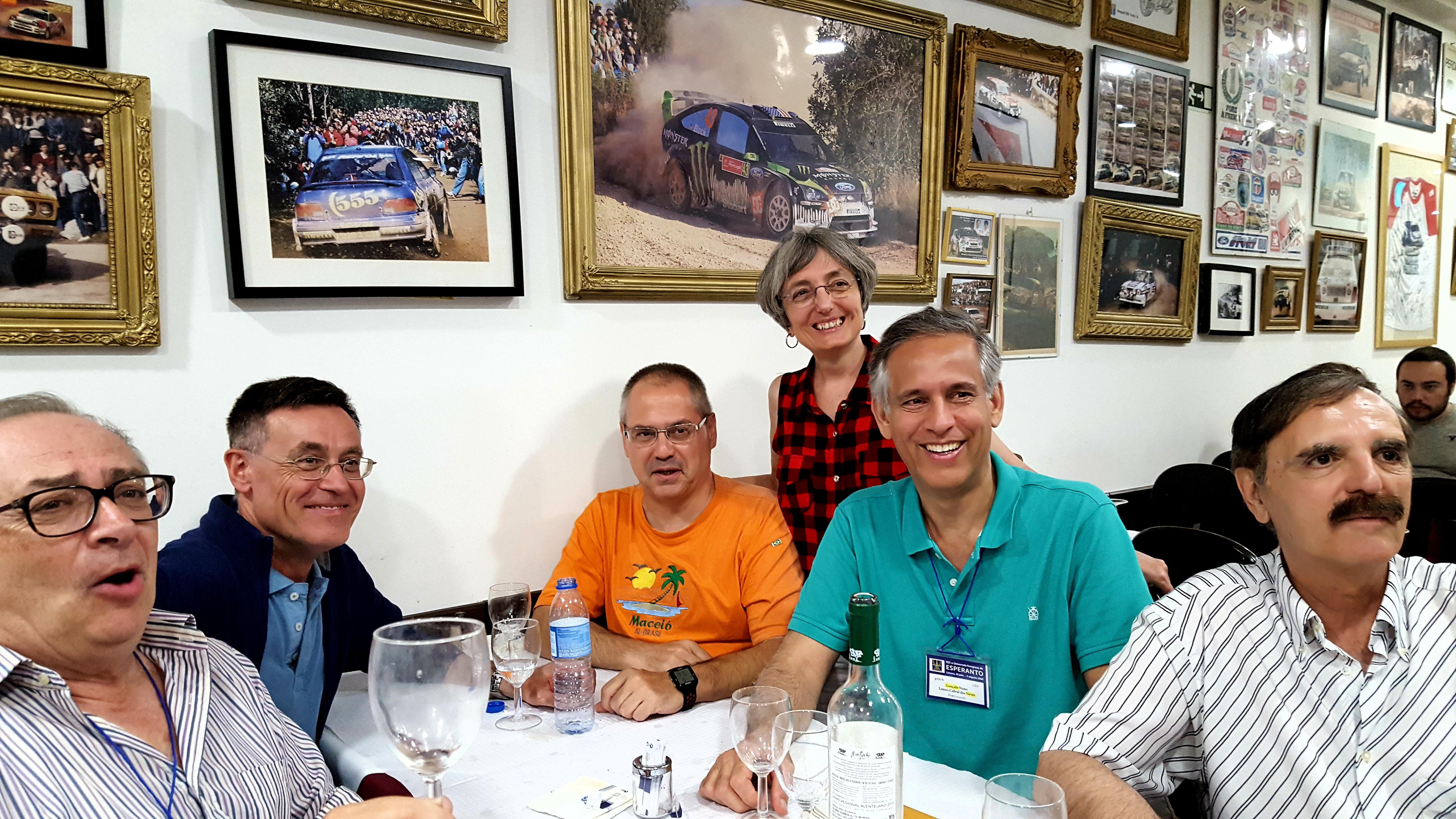 Kelkaj membroj de la Ibera Skolo de verkistoj. Dekstre: ): M. Fernández, A. Montagut, A. Valén, A. Manero (staras), G. Neves, M. Gutiérrez / Liven Dek.